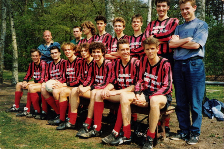 Merlijn 1 - promotie seizoen 1989/1990 row standing, left to right: Theo Heunen, Marc van Seeters, Mark Heller, Robert Selten, Eric de Kleijn, Peter Mimmel, Lars Cleijne, Eugene Theunisse. Sitting, left to right: Pieter Vonk, Eric Boerstoel, Wido van Bergen, Marc Dobbelaer, Eric Oerlemans, Jacco van Mierlo, Ivo van der Vegt.